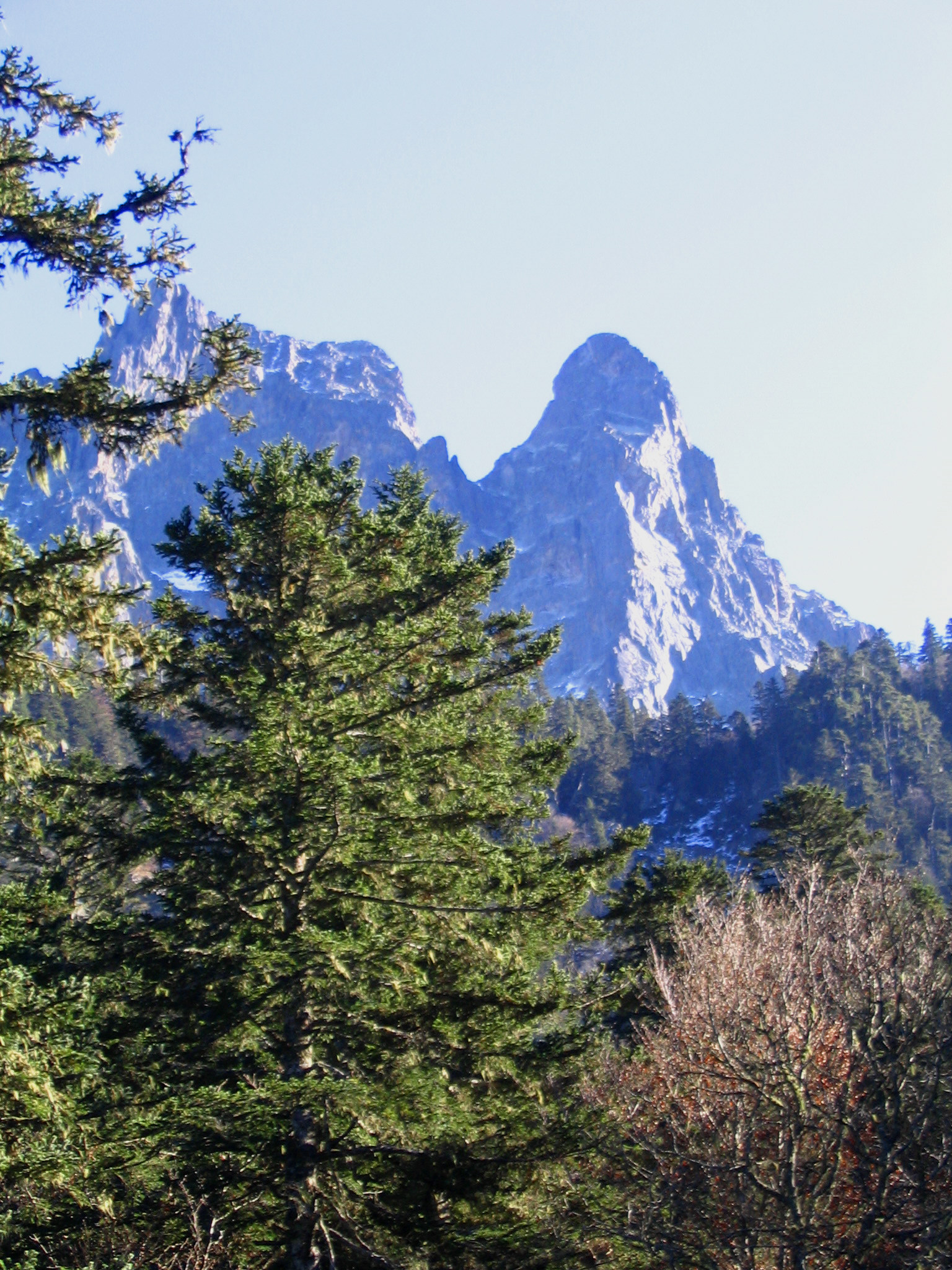 Vue du pic du midi d'Ossau depuis le lac de Bious-artigues, Parc national des Pyrénées - Pyrenées Atlantiques - France